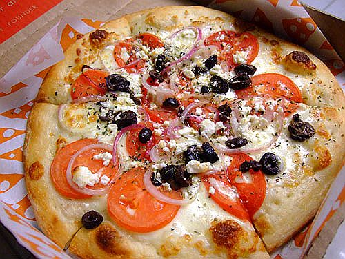 Greek pizza - kalamata olives, feta cheese, tomatoes, bell peppers, onions, etc.